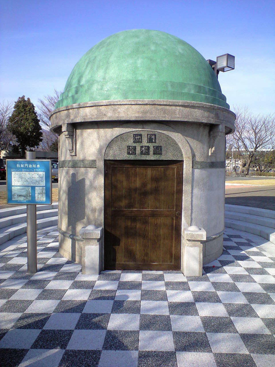 静岡県沼津市岡一色、旧門池配水塔（1933年（昭和8年））